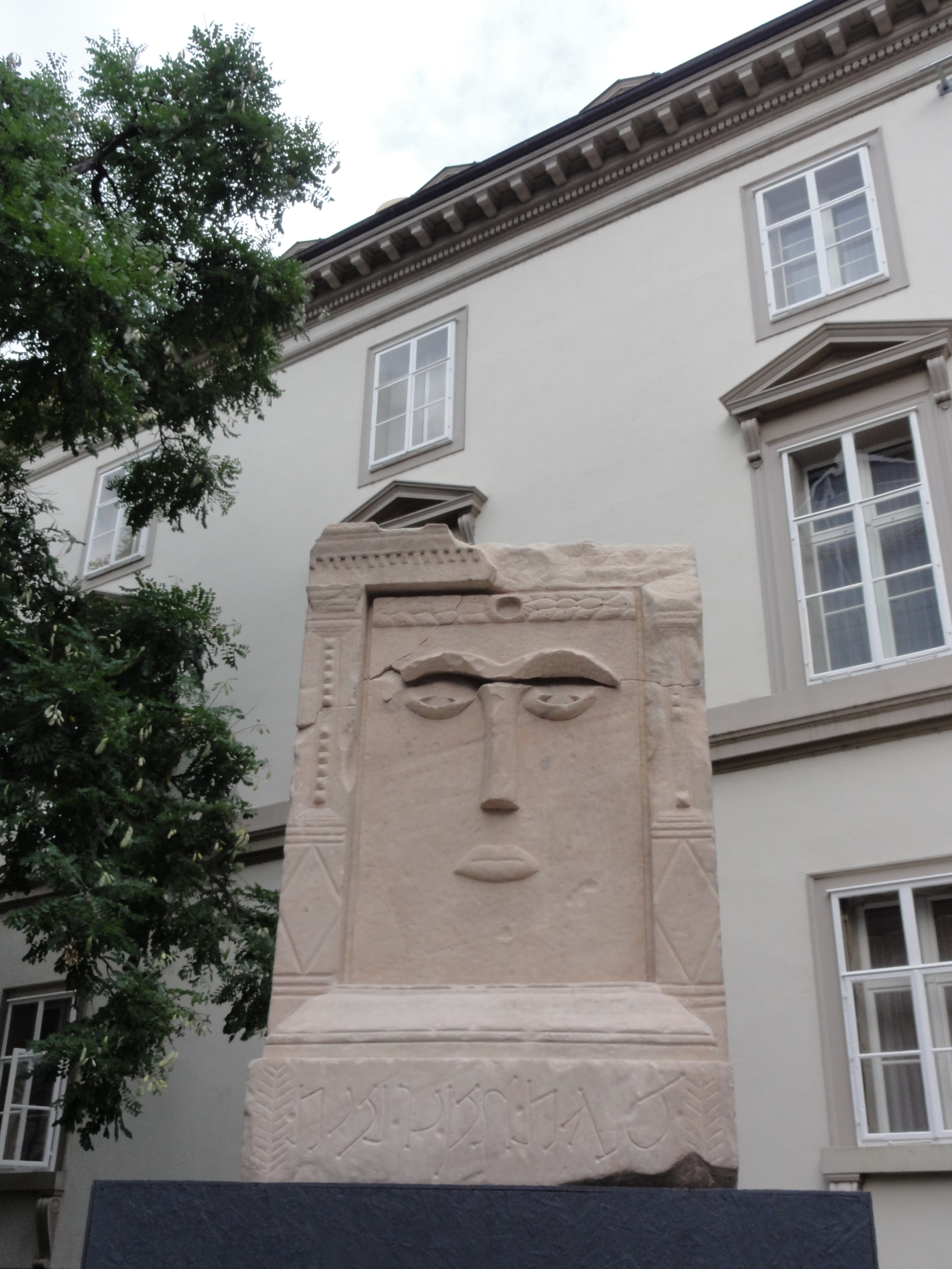 Basel — Antikenmuseum: nabatäische Augenstele (10fach vergrößerte Replik) vor dem Museumsgebäude (Antikenmuseum Basel und Sammlung Ludwig) anlässlich der Sonderausstellung „Petra. Wunder in der Wüste“ (ab 23. Oktober 2012) GPS data may be inaccurate. EXIF data regarding date and time may be inaccurate.